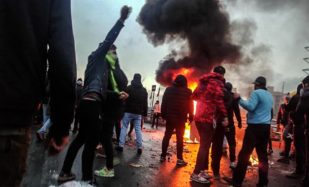 در جریان اعترضات مردمی به سهمیه‌بندی بنزین در ایران، تعدادی از بانک‌ها، پمپ بنزین‌ها و فروشگاه‌ها به آتش کشیده‌شدند.